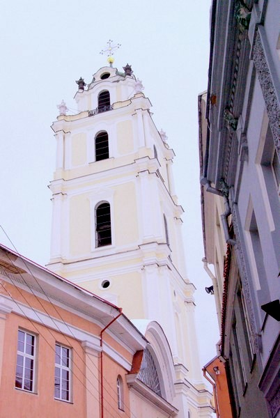 Šv. Jonų bažnyčios varpinė Pilies gatvėje Vilniuje